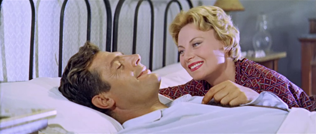 Scena del film Racconti d'estate (1958)